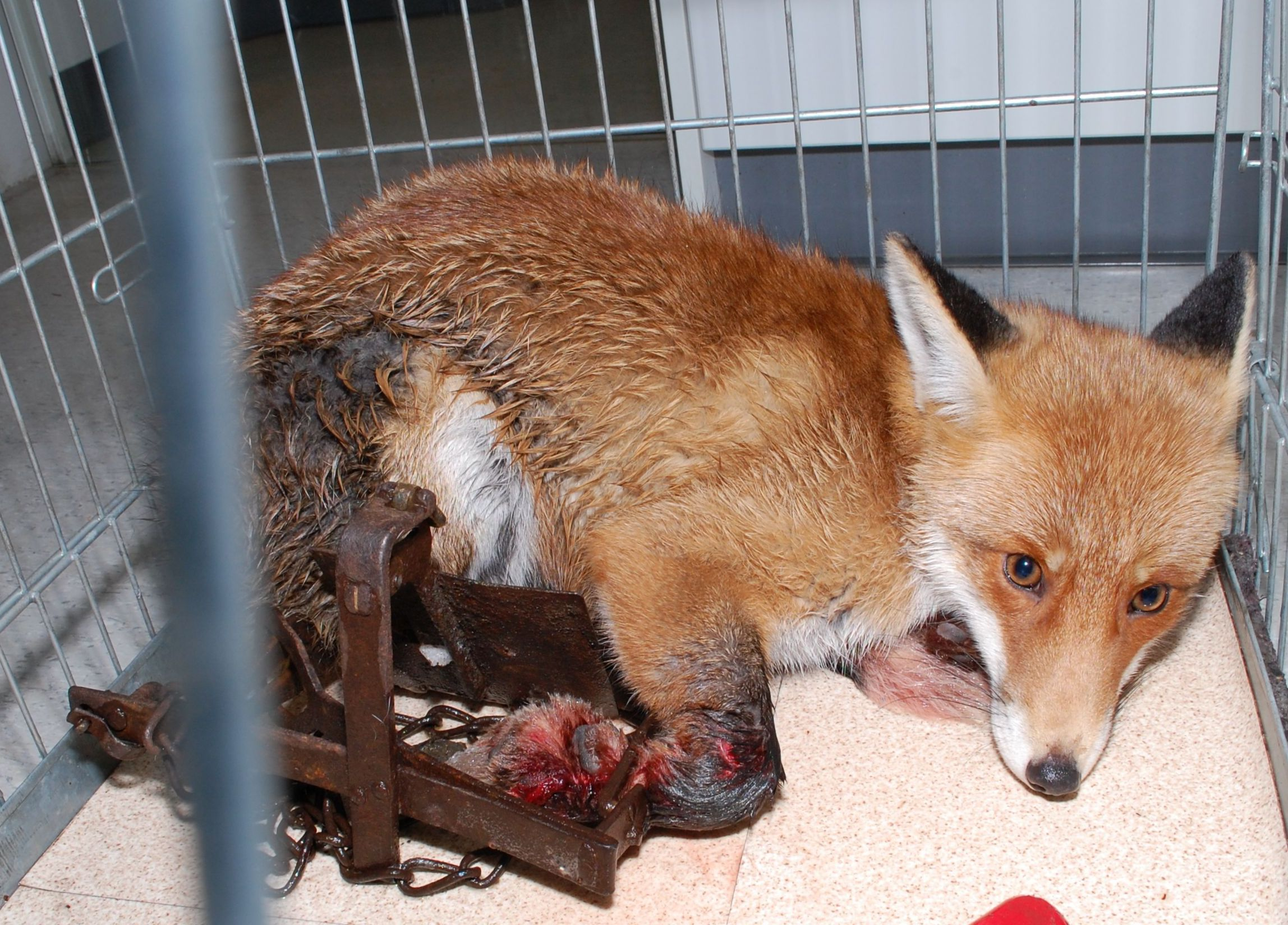 Rotfuchs (Vulpes vulpes), mit dem rechten Bein in einem illegal gestellten Tellereisen gefangen. Eichwalde, Landkreis Dahme-Spreewald, Land Brandenburg. Der Fuchs hatte sich mit der Falle losgerissen und war damit bis in einen Garten gelaufen. Die Gartenbesitzer versuchten vergeblich, die Falle zu entfernen und fuhren dann mit dem Fuchs in eine Tierklinik in Berlin. Dort wurde die Falle entfernt. Der Fuchs musste aufgrund seiner schweren Verletzungen eingeschläfert werden.